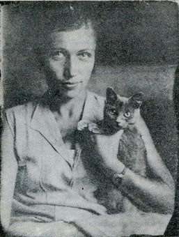 Фотография Наталии Абрамовны Ушаковой